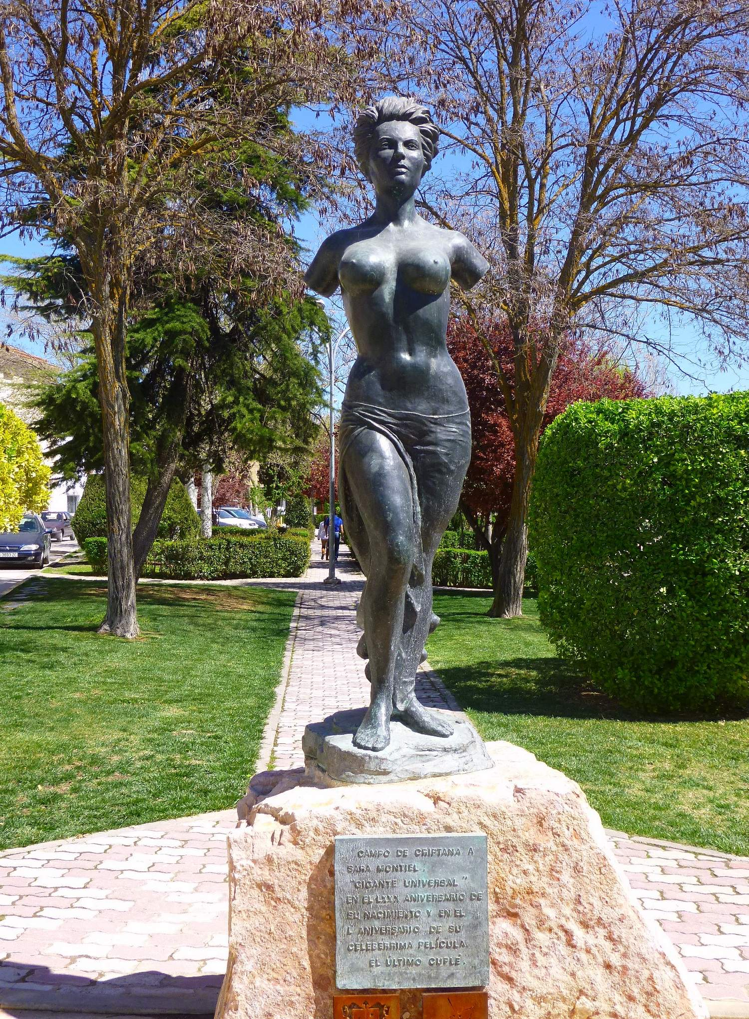 Monumento a Sara Montiel, en su Campo de Criptana (Ciudad Real) natal